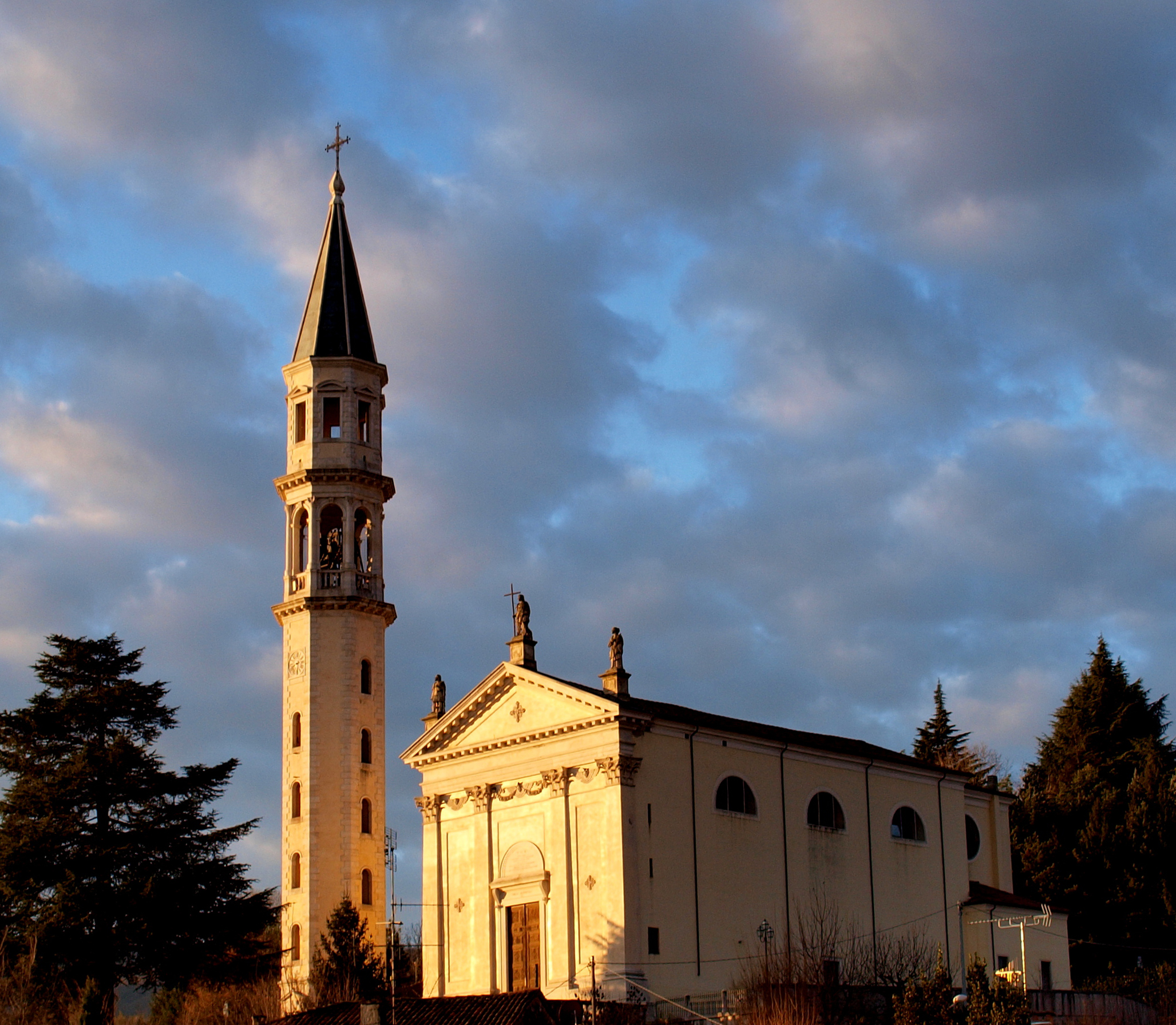 chiesa di San vito di Leguzzano(vi) al primo mattino